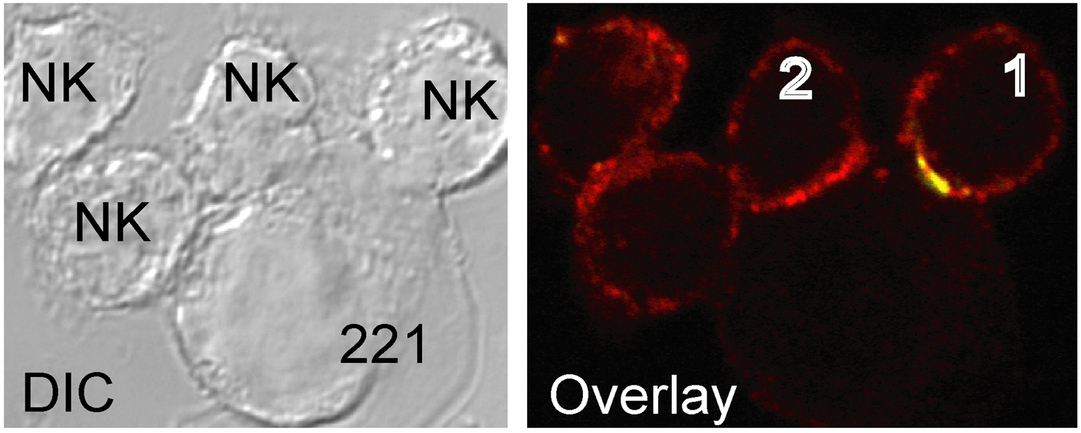 Figura 2.(A)_Los receptores CD2 de células NK humanas, se acumulan tanto en sinapsis activadoras como en sinapsis inhibitorias. Microscopía de Campo claro (imagen izquierda) muestra células NK, colocadas junto a sus células blanco (221). Las células NK humanas fueron activadas mediante IL-2 . La célula NK#1, muestra expresión de KIR, y representa una sinapsis inhibitoria. La célula NK#2, que carece de expresión KIR2DL1, muestra una sinapsis activadora. Inmunohistoquímica. Microscopio de campo claro y Microscopio confocal (color).